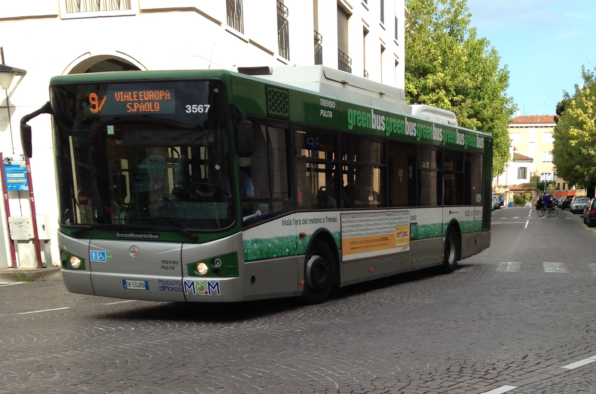 Autobus 3567 BredaMenarinibus Avancity di MOM-Mobilità di Marca (ex ACTT), presso Piazza Pio X in Treviso, in servizio urbano sulla Linea 9/, diretto a Viale Olimpia, Quartiere San Paolo, per Viale Europa.